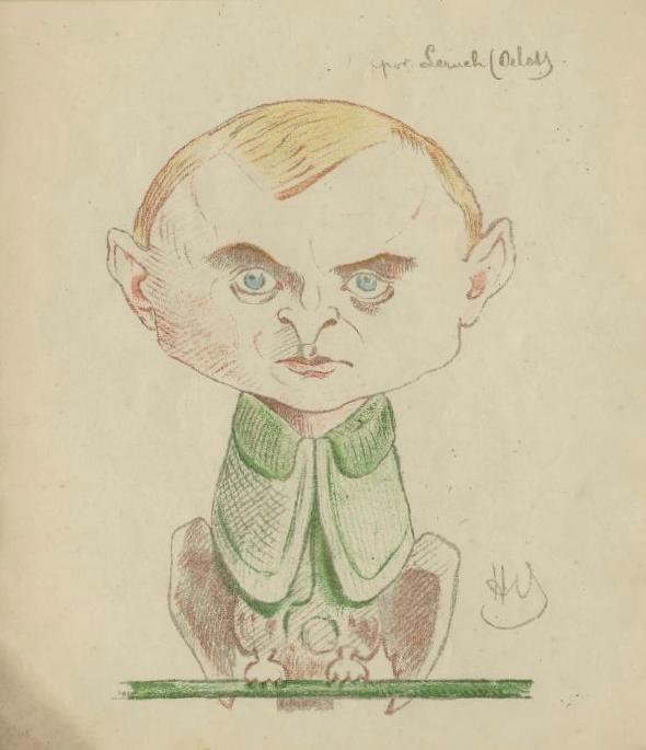 ppor. Legionów Poskich Rudolf Leroch-Orlot - portret rysunkowy autorstwa Henryka Hetza-Barwińskiego